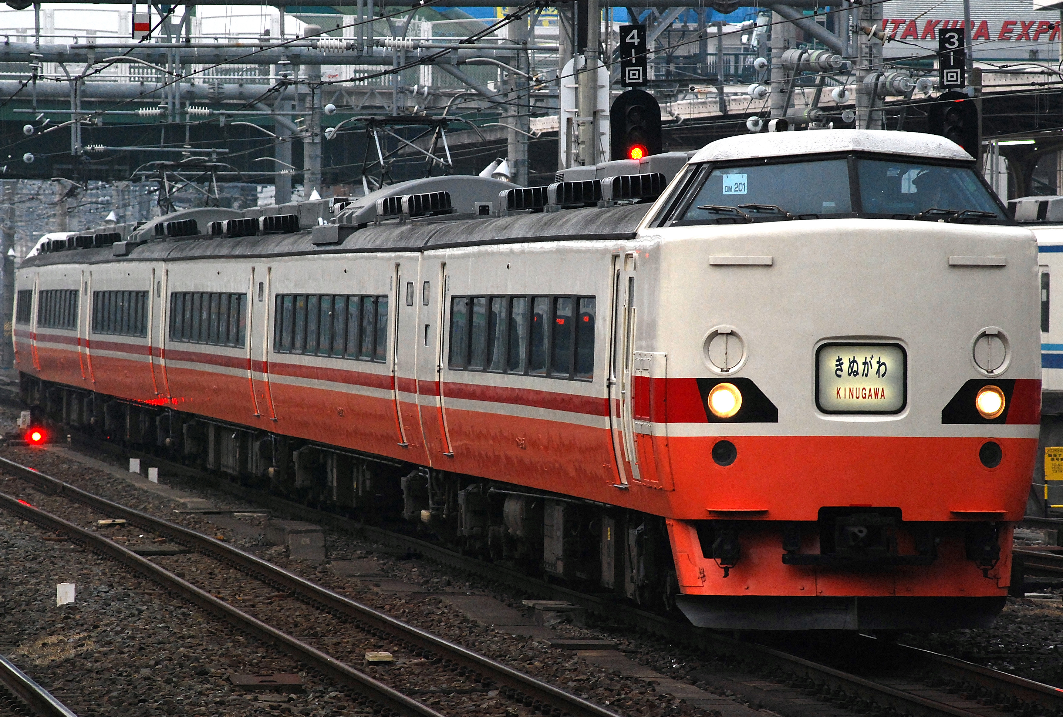 大宮駅に進入する189系「彩野」編成によるきぬがわ号